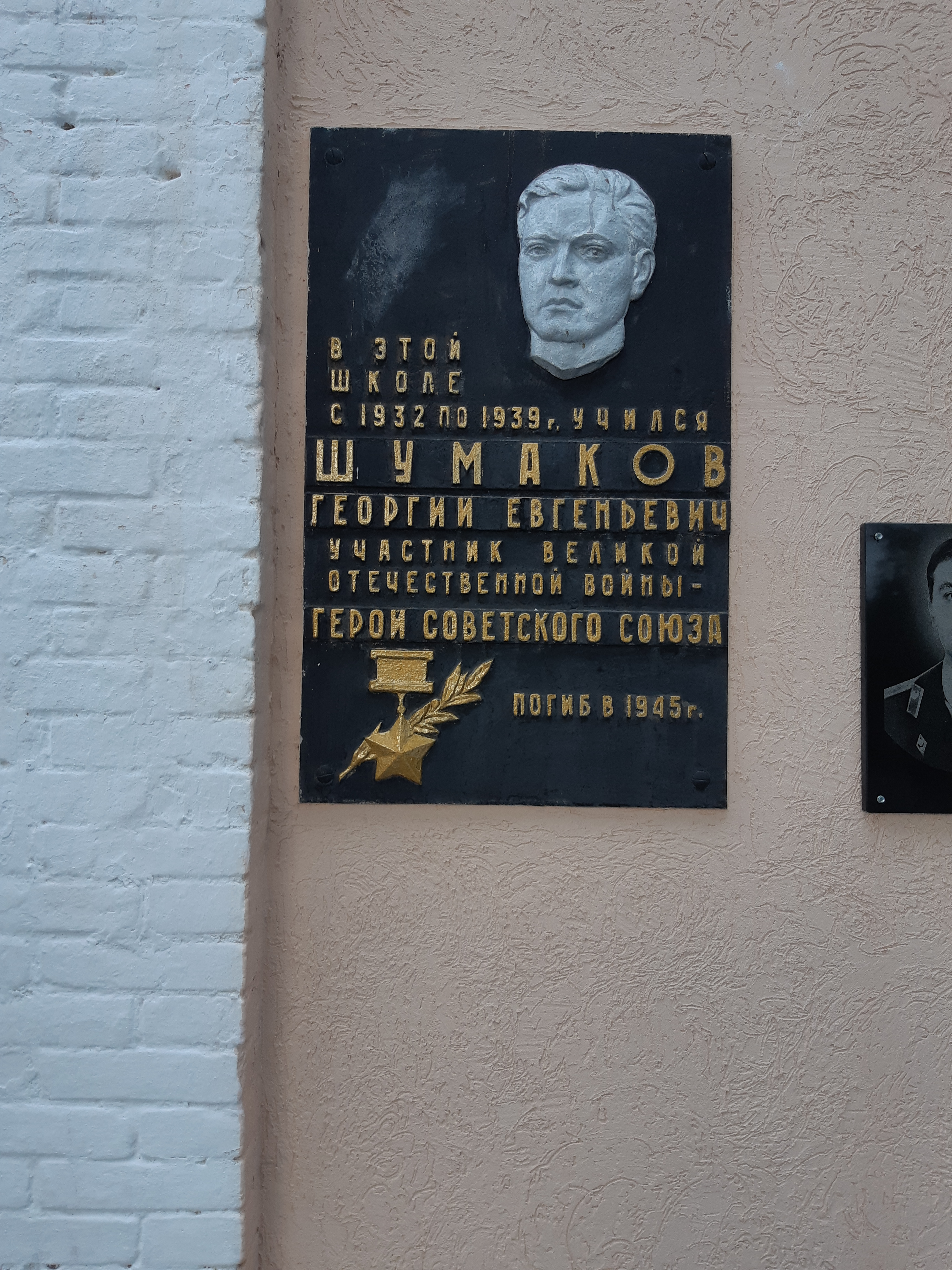 Здание, где учился в школе герой Советского союза Г.Е. Шумаков: улица Гоголя, 112, Майкоп, Адыгея